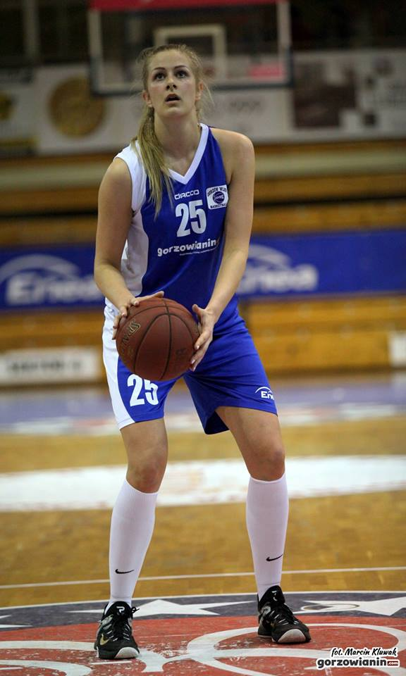 Środkowa AZS PWSZ Gorzów